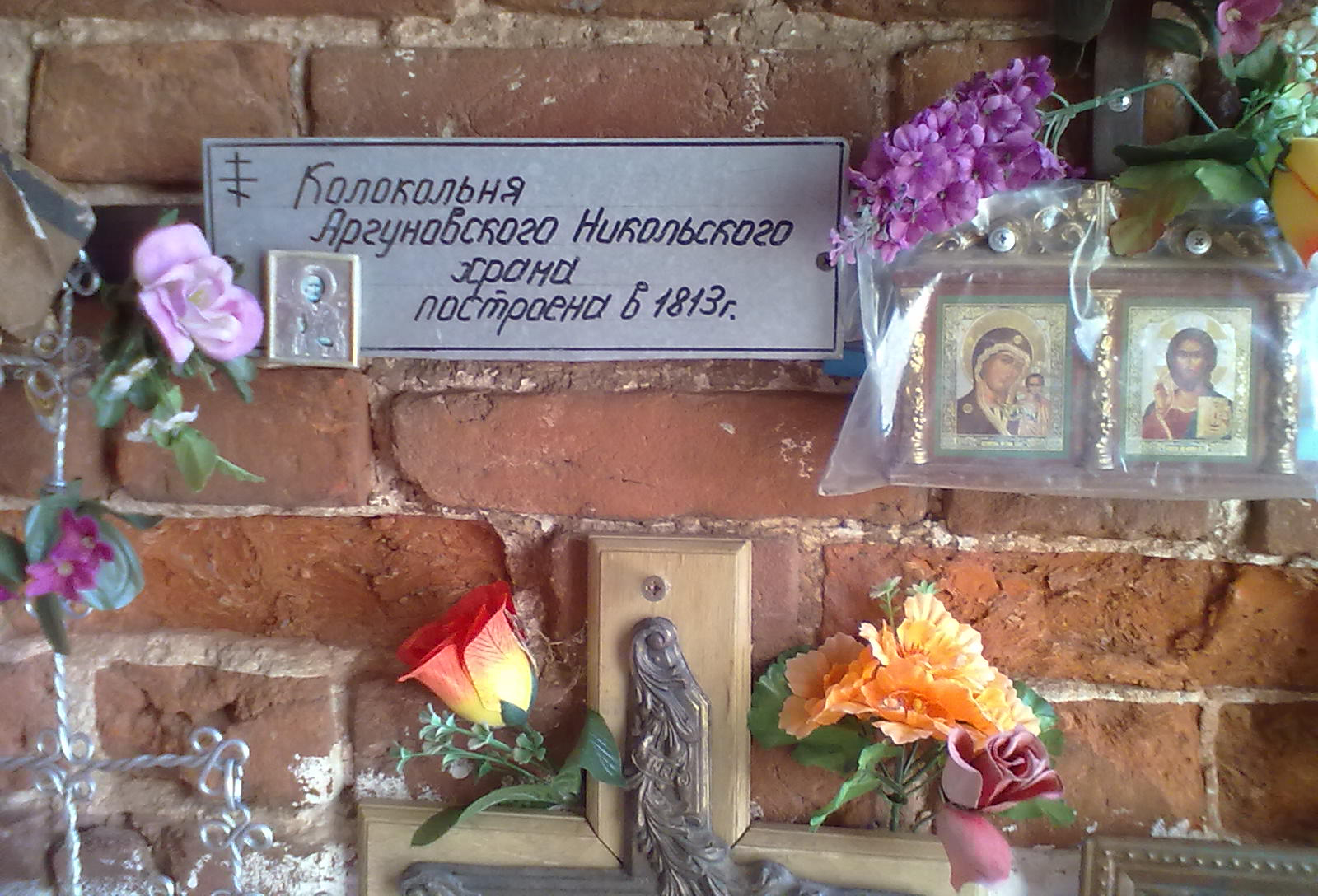 Аргуновский Никольский храм (Урочище Аргуново)